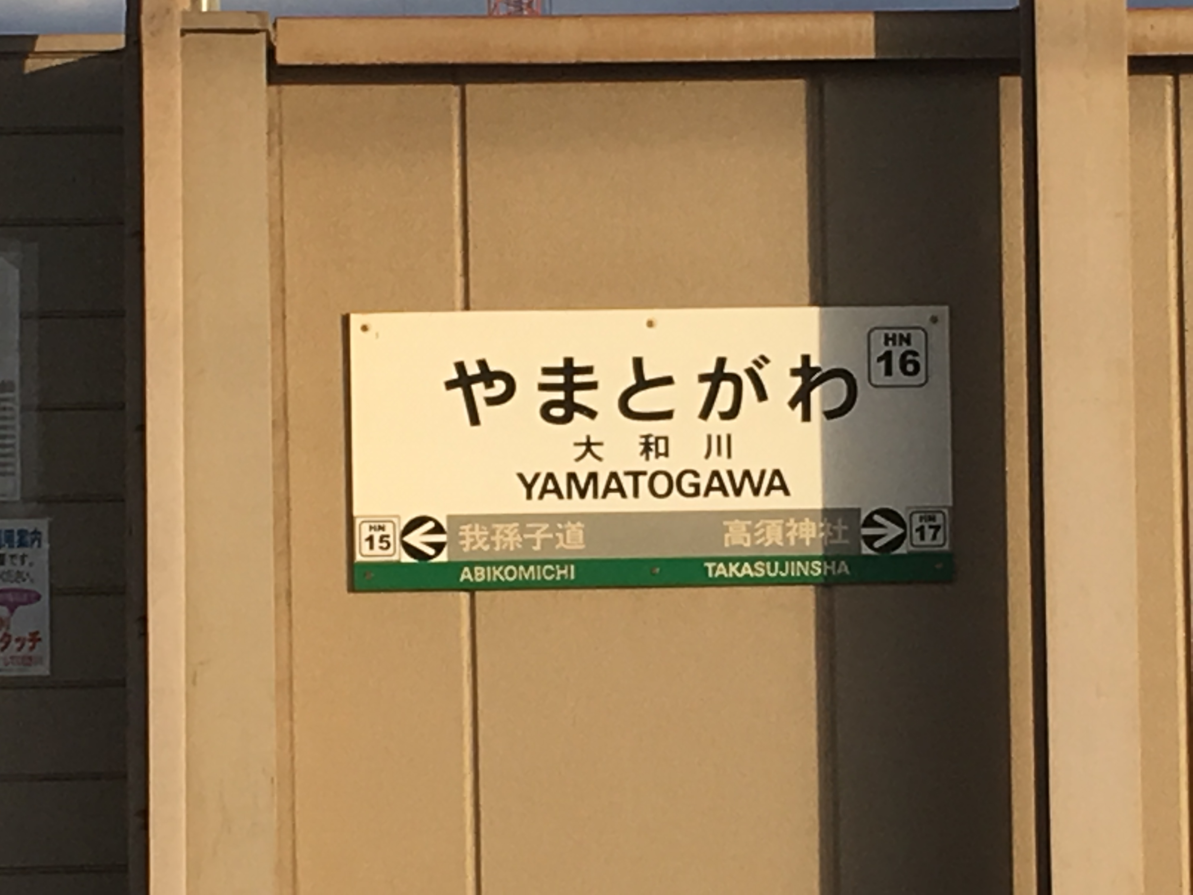 停留所番号が入った阪堺大和川停留場の駅名標